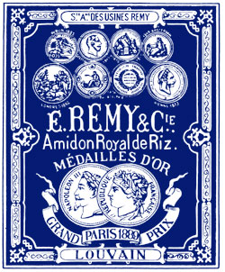 Emballage d'amidon DE BECKER REMY